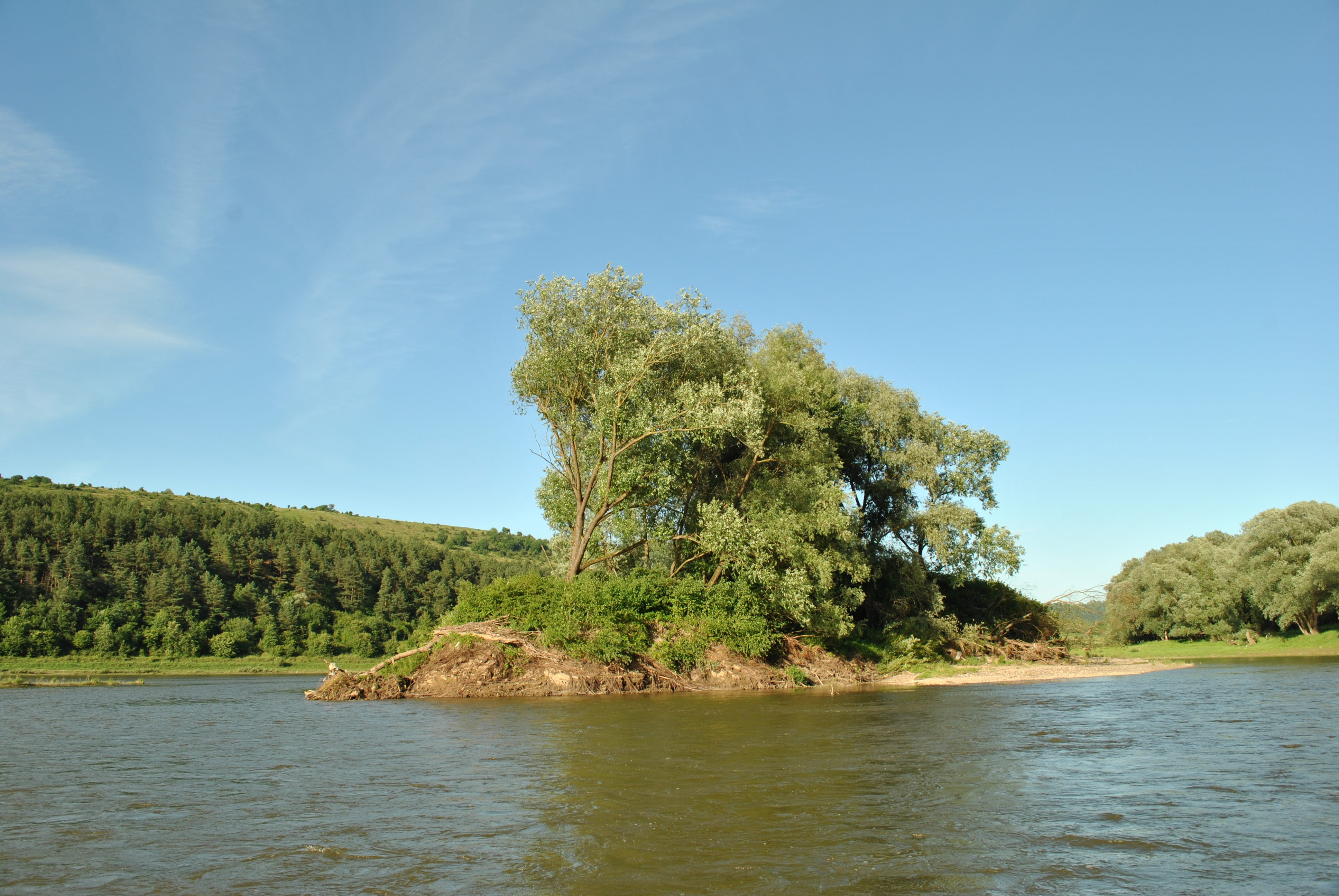 «Дністровський каньйон» у Бучацькому районі Тернопільської області поблизу с. с. Губин.